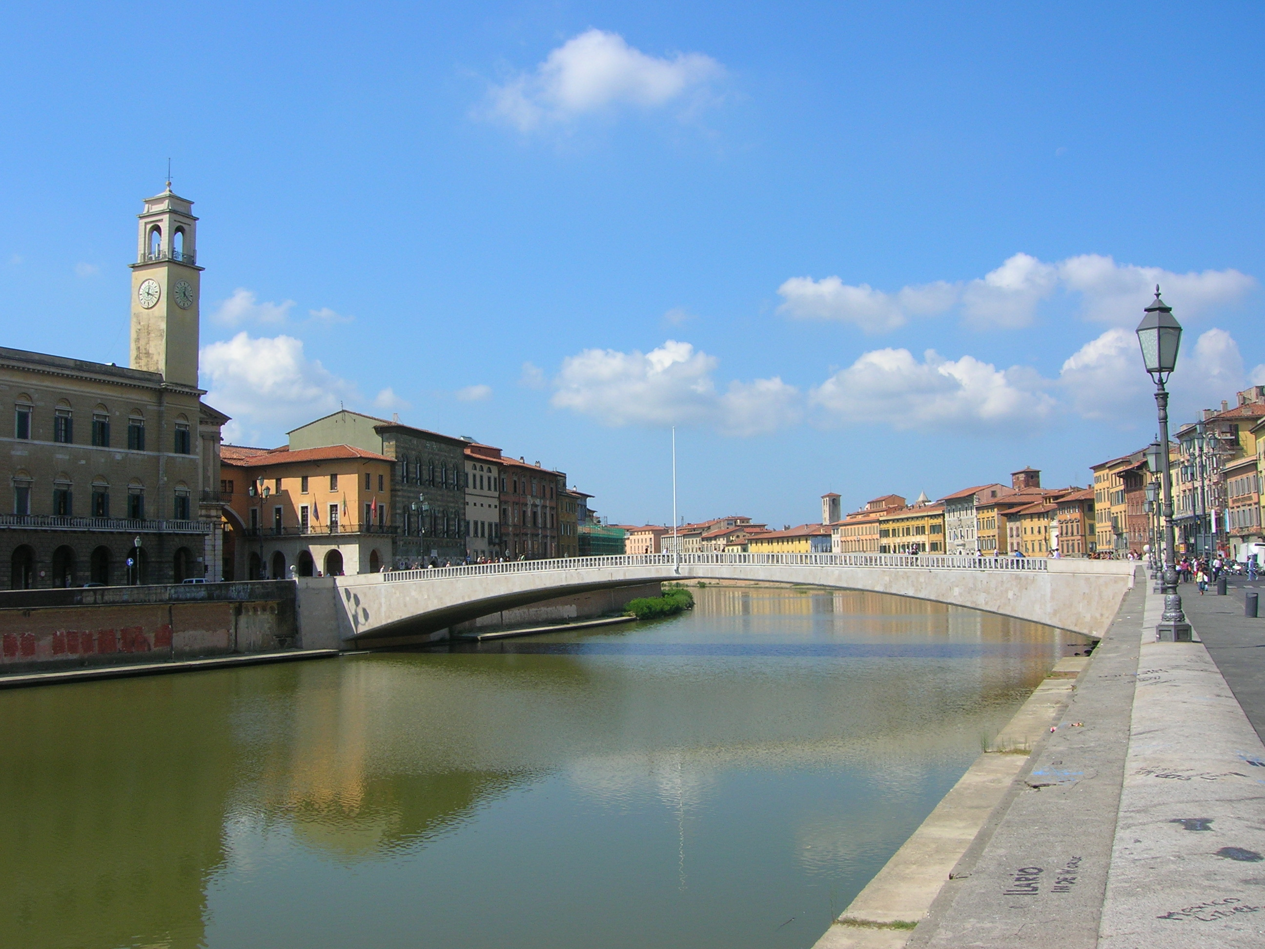 Pisa - Ponte di Mezzo visto da est